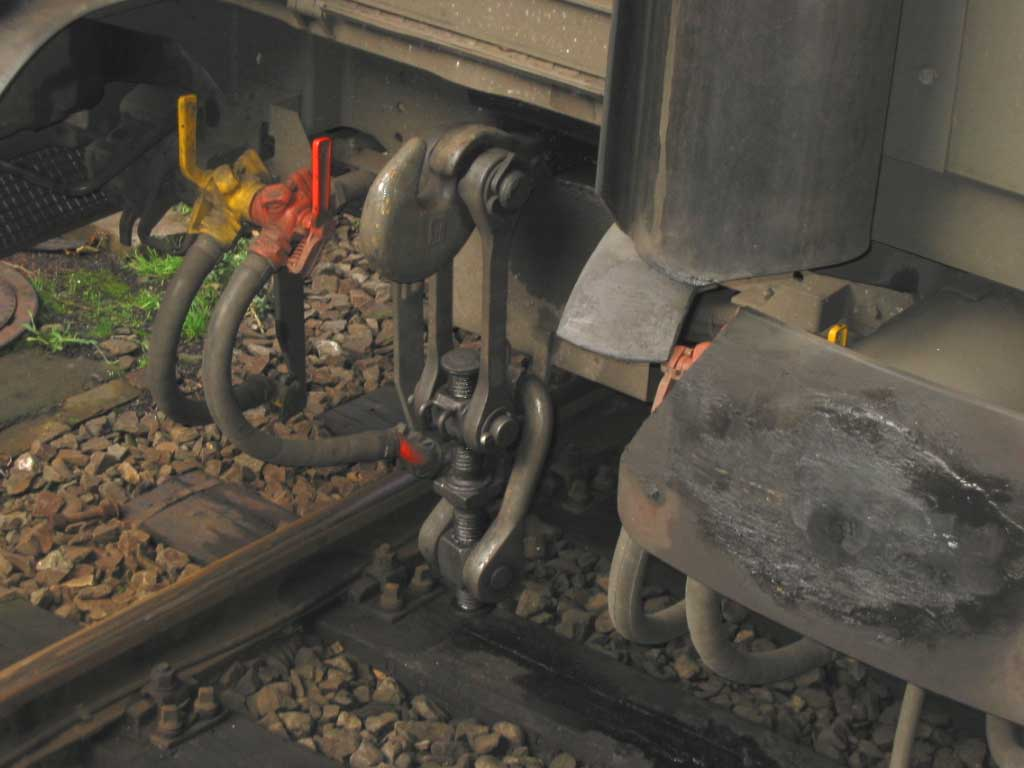 Schraubenkupplung frei